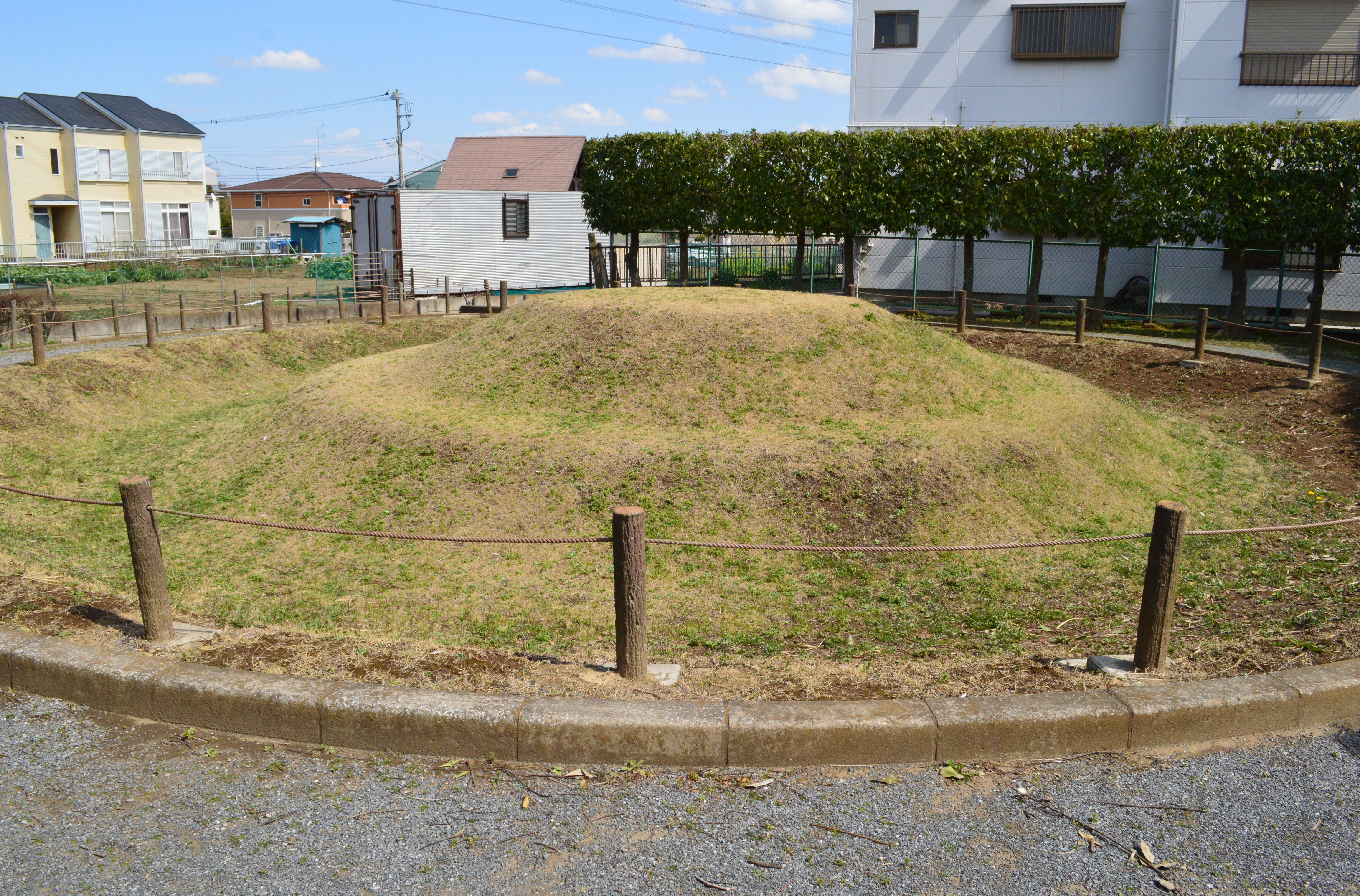 稲荷台1号墳 再現墳丘 Nikon D3200